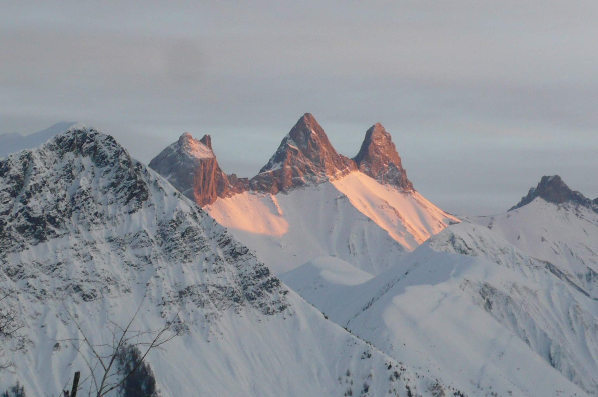 Les Aiguilles d'Arves - Coucher de soleil - Vue depuis La Toussuire